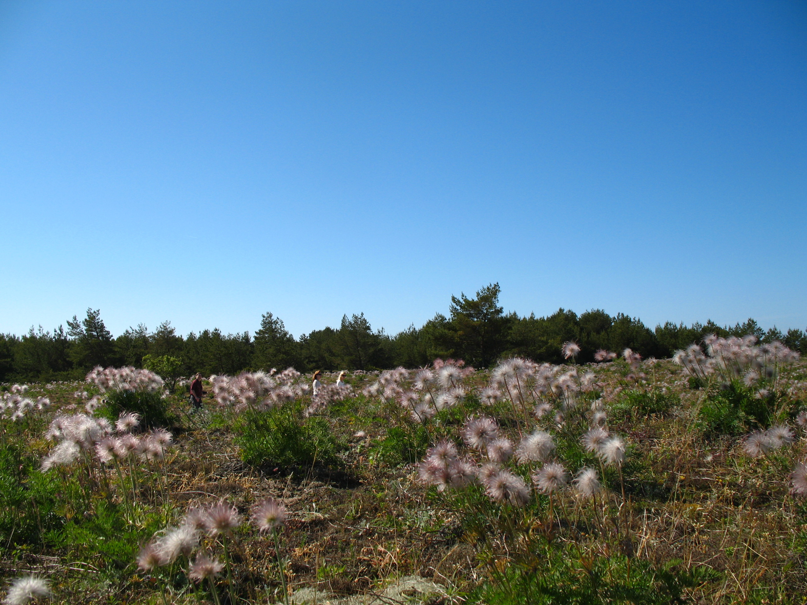 Vilsandi rahvuspark Saaremaal